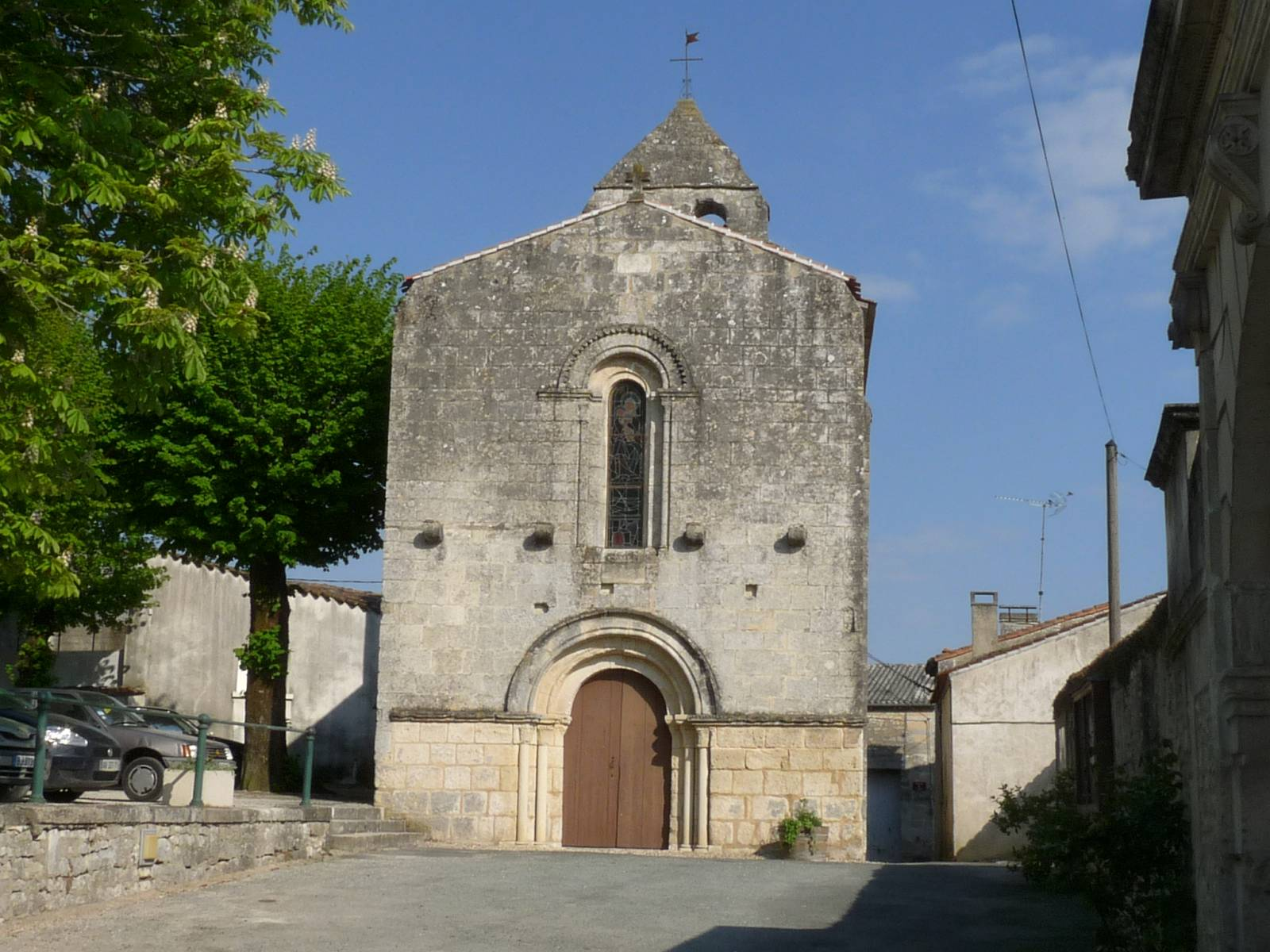 Eglise de St-Simon, Charente, France